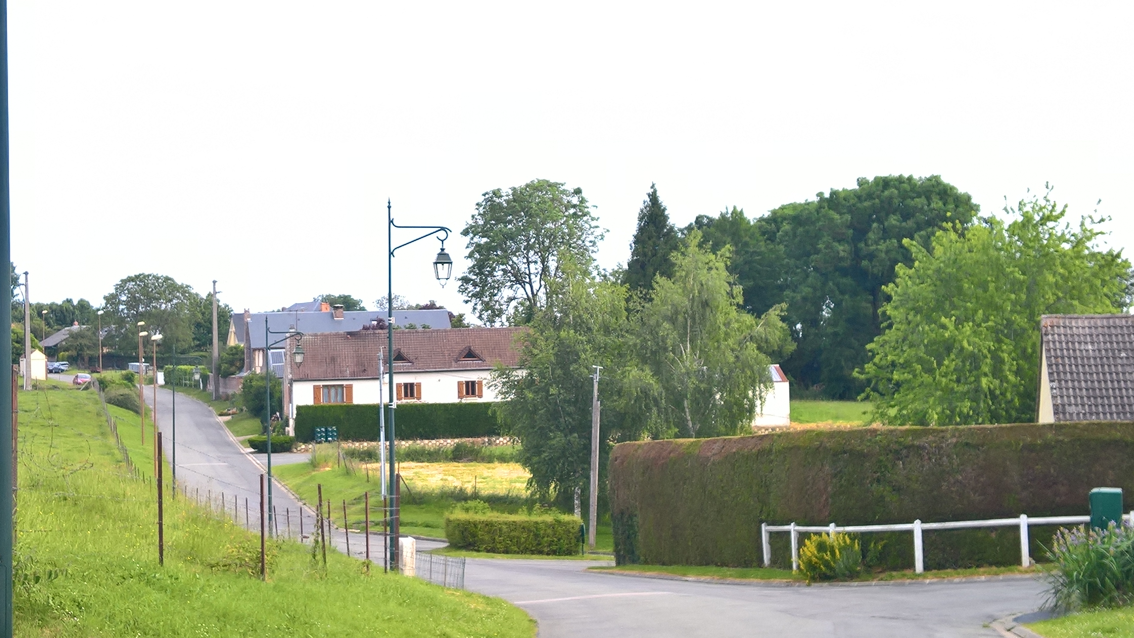 Puits-la-Vallée : paysage urbain (la rue du pré depuis l'église)